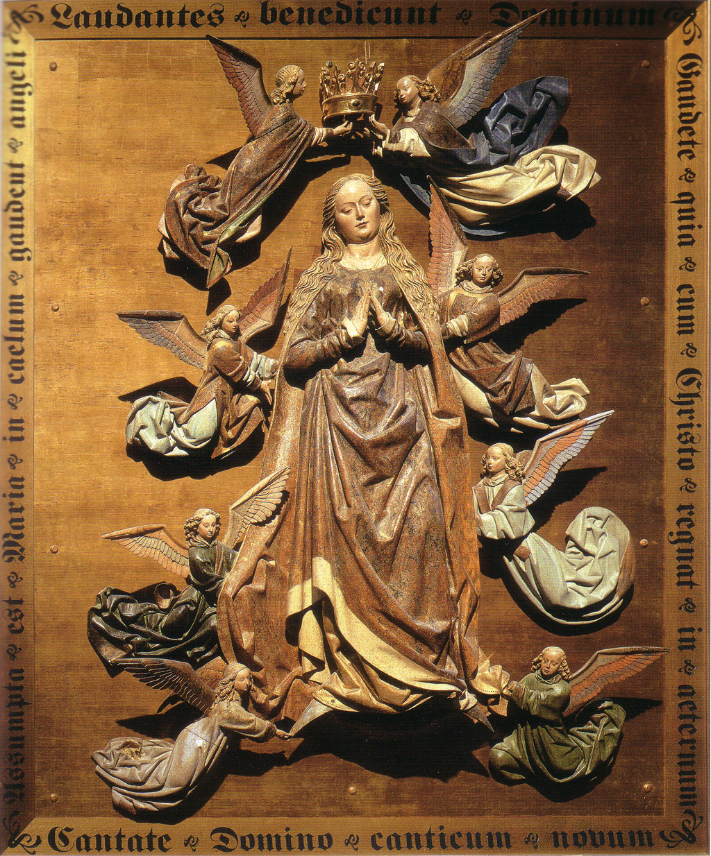 Conjunto flamenco de la segunda mitad del siglo XV procedente del Señorío de Somalo